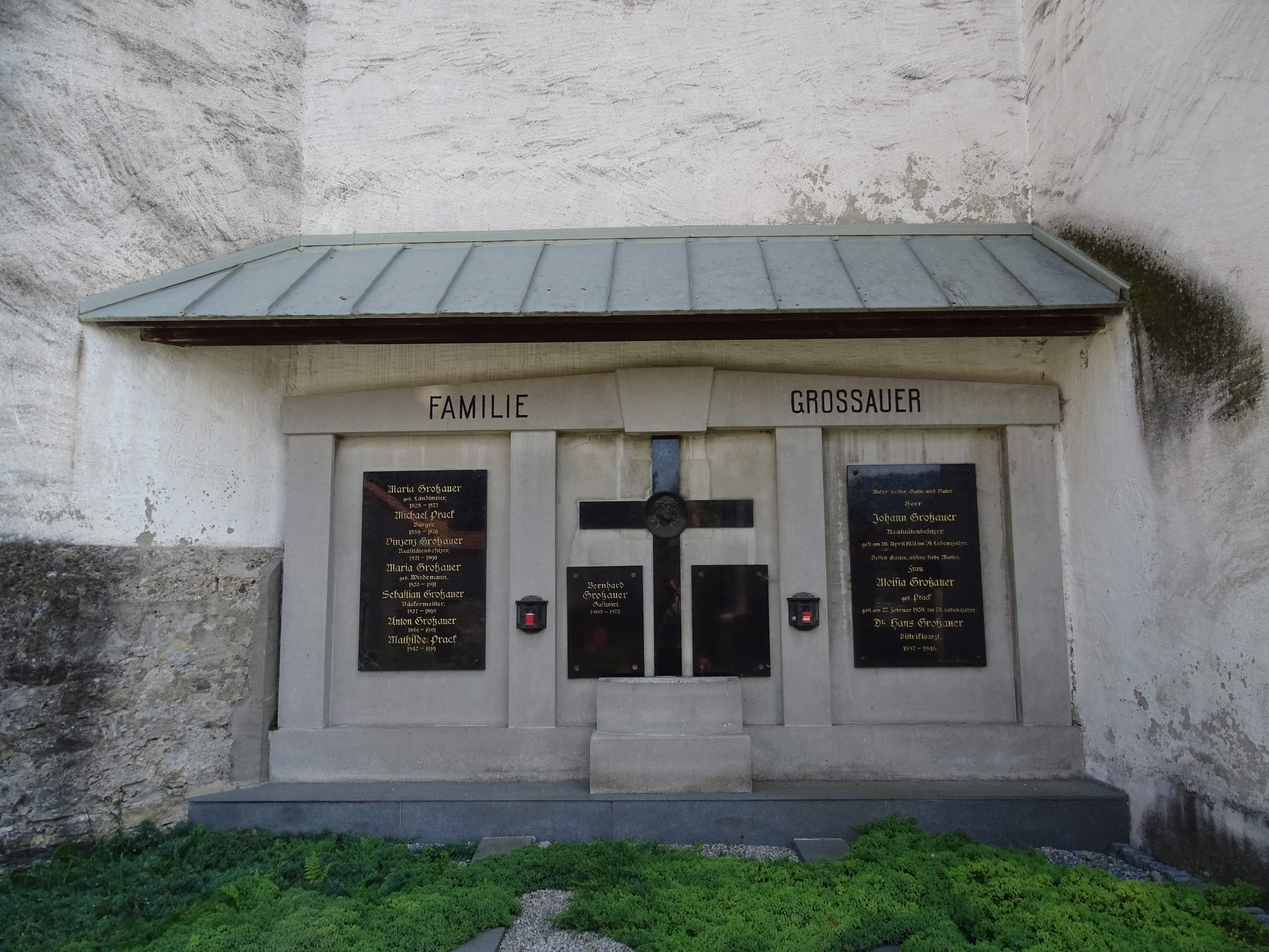 Grabstein der Familie Grossauer an der Aussenmauer der Pfarrkirche Übelbach. Die Inschriften lauten: Maria Großauer geb. Ländlmeier 1828-1872 //Michael Prack, Bürger. 1839-1875 //Vinzenz Großauer, Realitätenbesitzer. 1821-1890// Maria Großauer, geb. Wiedemann. 1823-1891 //Sebastian Großauer, Bäckermeister. 1827-1898 //Anton Großauer 1861-1901 //Mathilde Prack 1842-1919 Bernhard Großauer, Gastwirt. 1900-1973 Unser bester Gatte und Vater Herr Johann Großauer, Realitätenbesitzer. gest. 20. April 1931 im 79. Lebensjahre.// Dessen Gattin, unsere liebe Mutter, Frau Aloisia Großauer, geb. Prack, gest. am 22. Februar 1939, im 74. Lebensjahre.// Dr. Hans Großauer, Distriktsarzt, 1897-1946